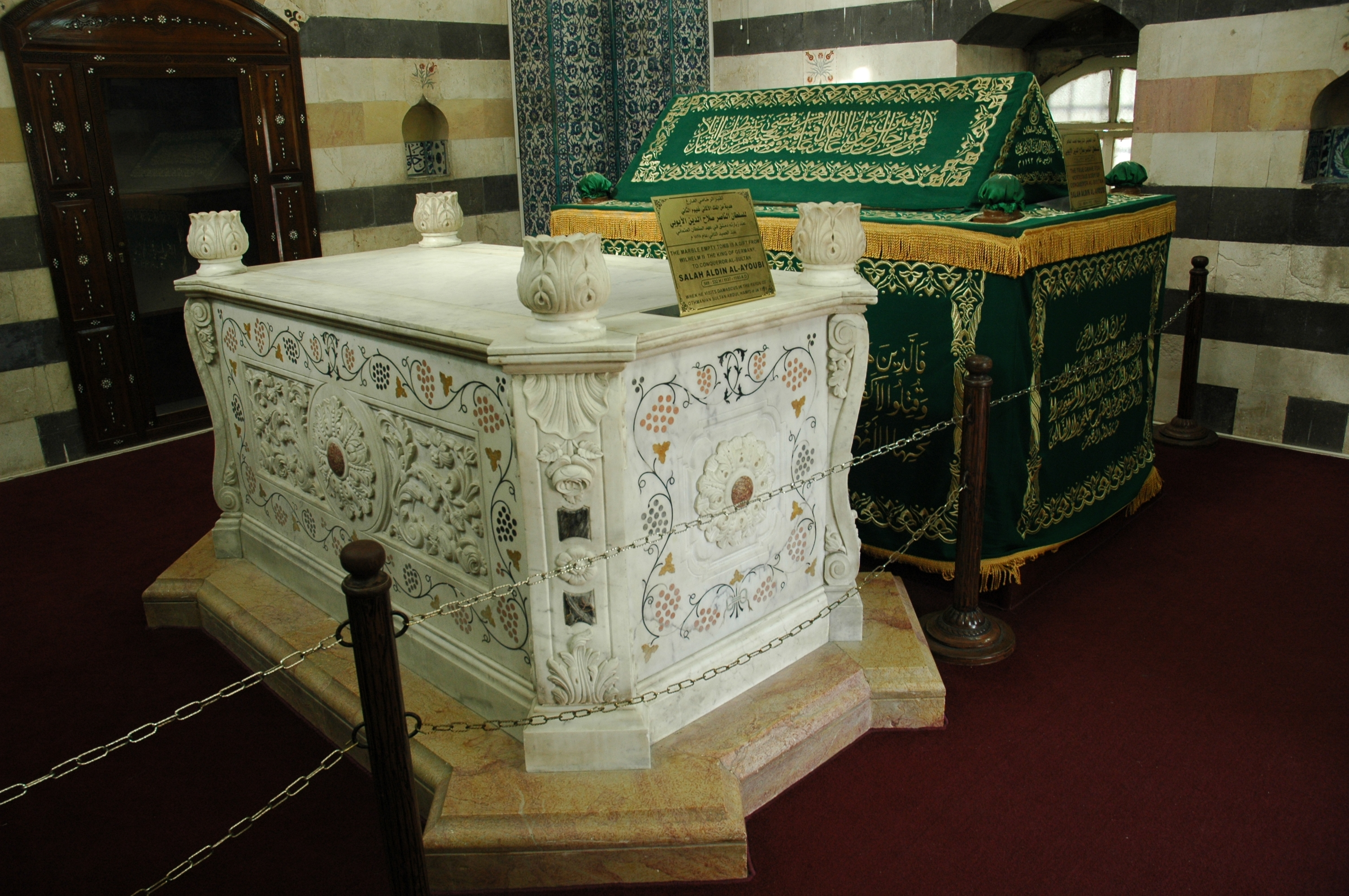 Salahadin's Tomb, Umayyad Mosque, Damascus 001